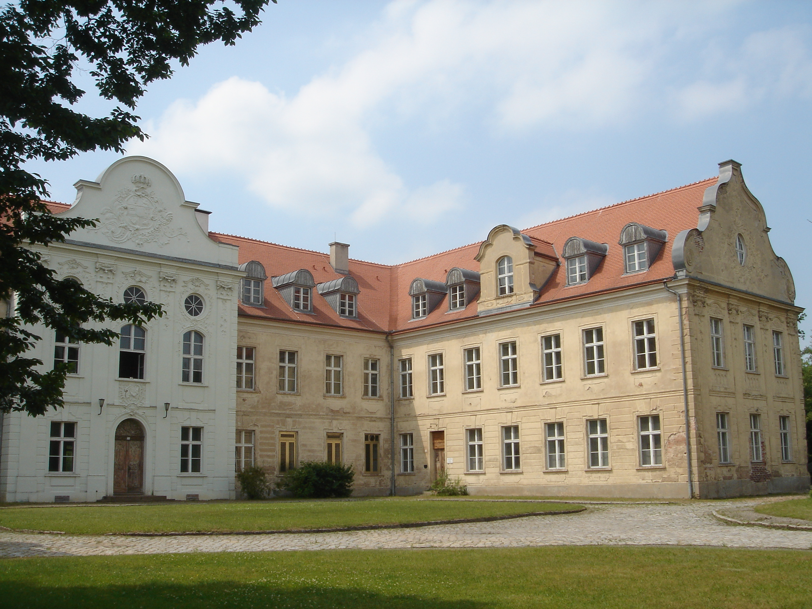 Das Schloss zu Fürstenberg/Havel, im Sanierungszustand von Juni 2006: Mittelrisalit bereits neu gestrichen, Entkernungsarbeiten im Innern. Selbst fotografiert von Benutzer:Bordeaux.